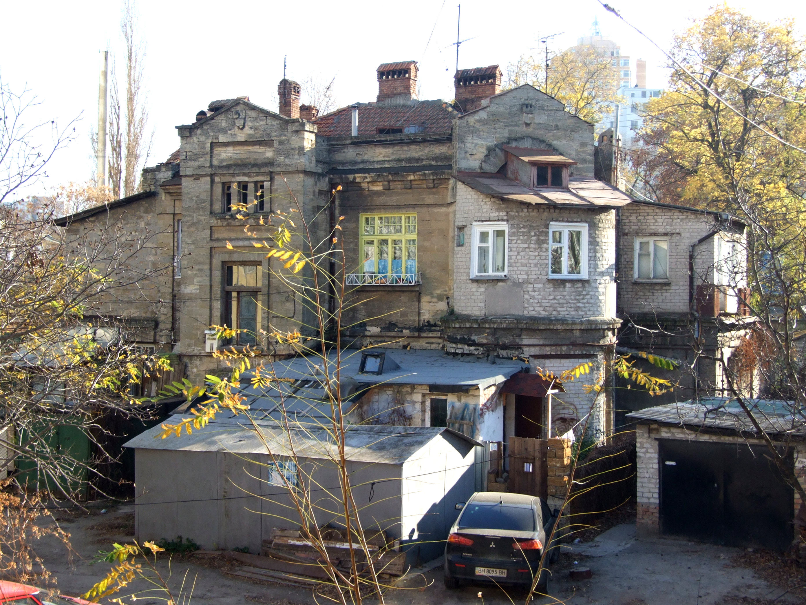 Котедж селища "Самопоміч", інж. А. М. Клепінін, 1911 р., Кленова вул., 11